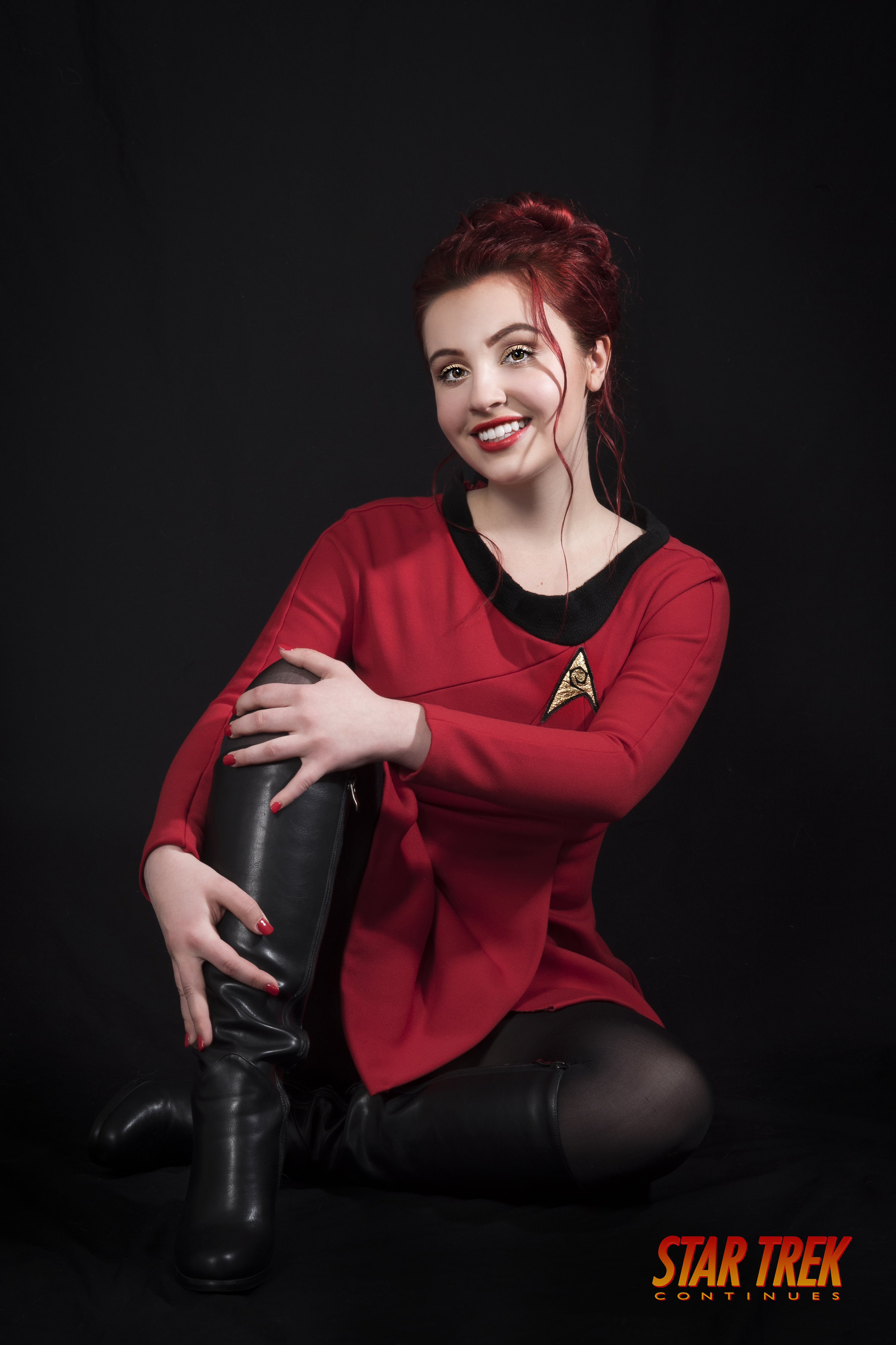 Emie Morissette - Actrice dans Star Trek Continue